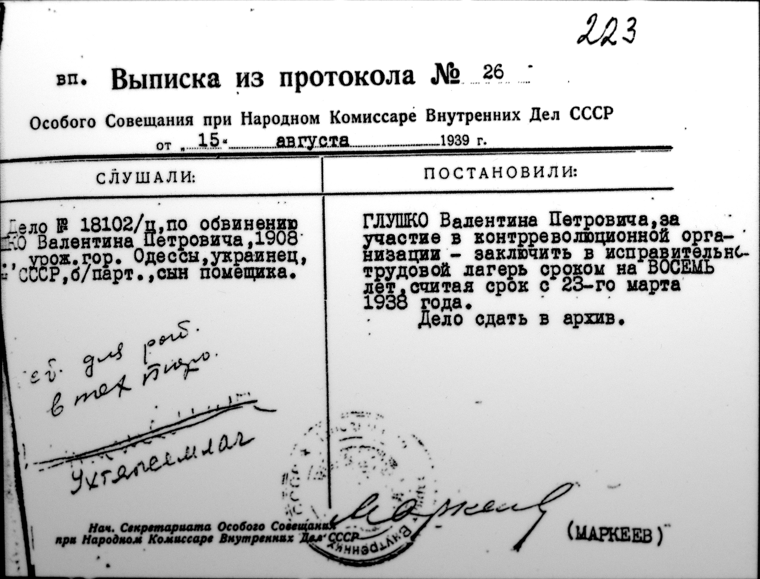 Выписка из протокола № 26 Особого Совещания при Народном Комиссаре Внутренних Дел СССР, приговор В. П. Глушко This photograph taken in Museum of Space and Missile Technology (Saint Petersburg) Note: Museum co-ordinates is: - Google Maps - Google Earth